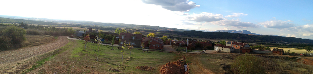 Panoramica de Canalejas